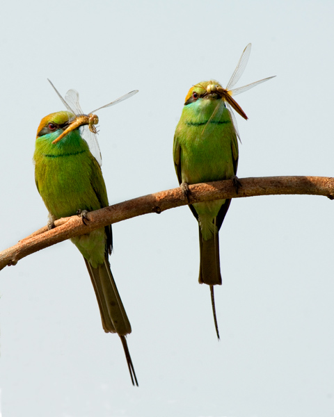 വേലിത്തത്തകൾ